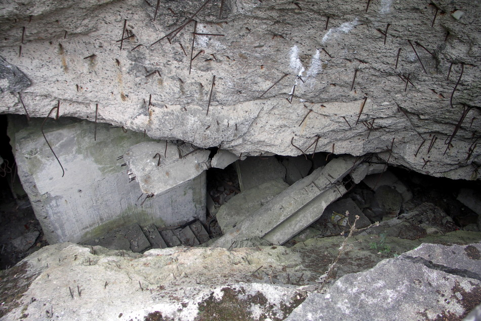 Reste der Funkstation "Koralle"